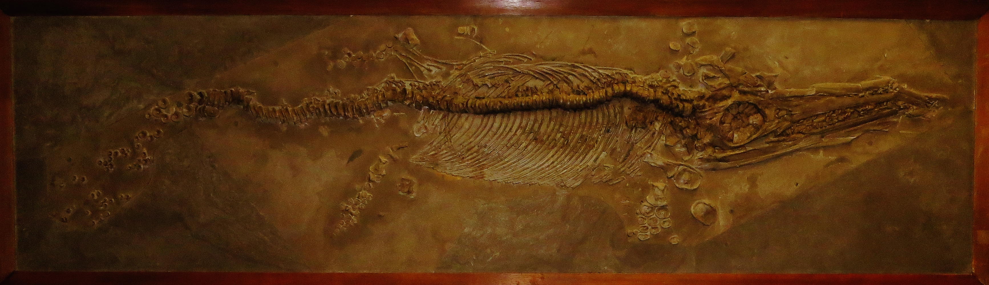 Fossil of Suevoleviathan, an extinct reptile- Took the picture at Museum of Paleontology at Tuebingen